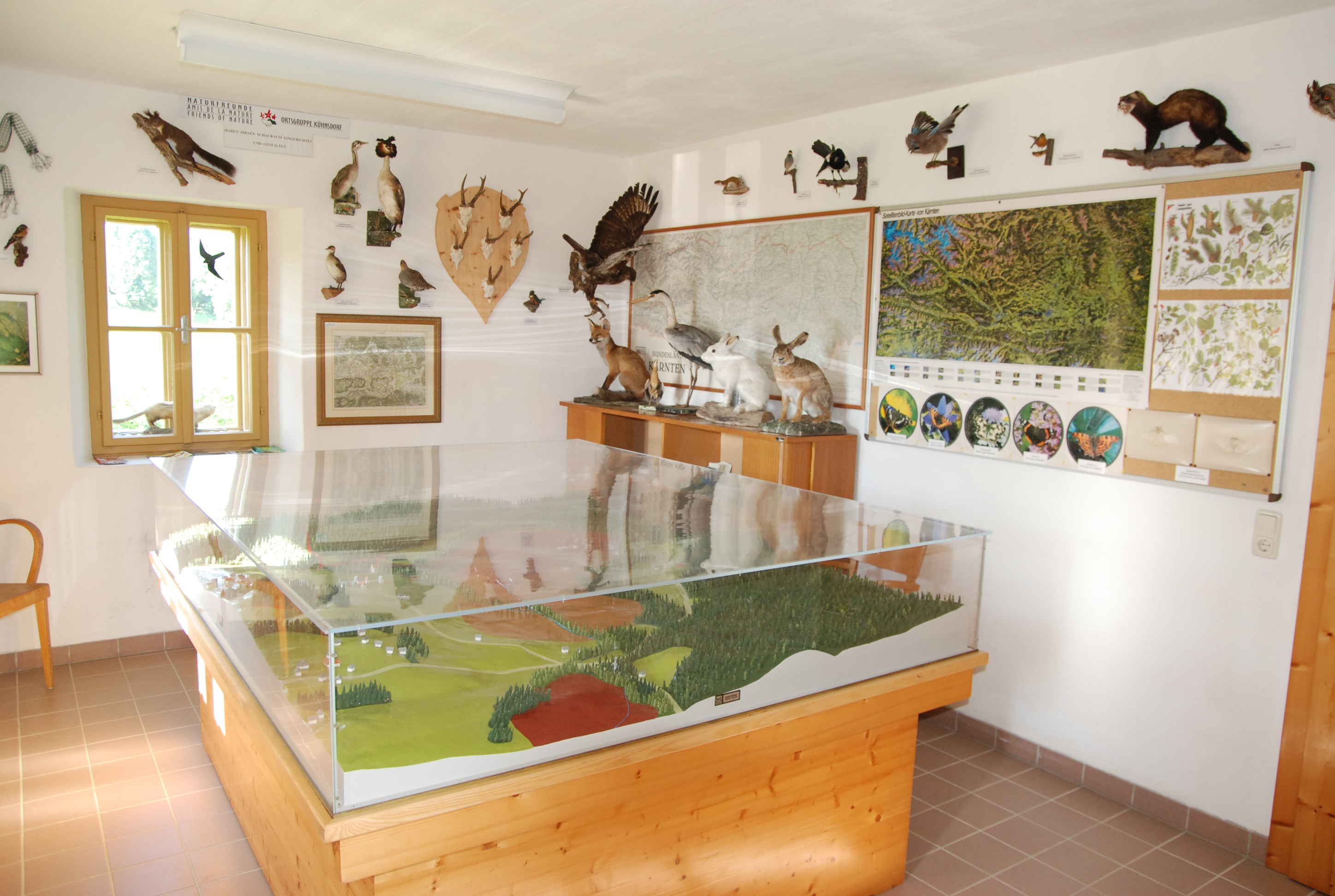 Im Besucherzentrum Tomarkeusche befindet sich auch ein Museum zum Thema Sablatnigmoor